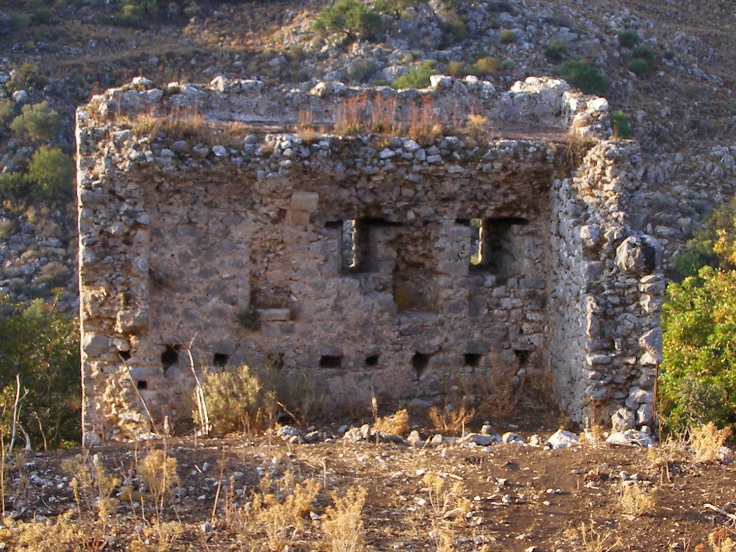 Torturm der Festung Bonriparo auf Kreta